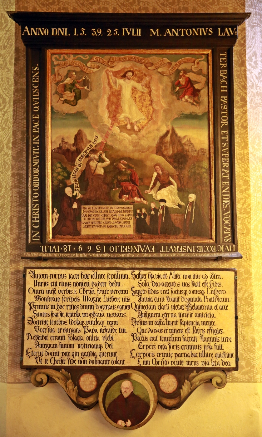 Pirna, Stadtkirche St. Marien: Epitaph von Anton Lauterbach (1502-1569), Theologe und Reformator, erster evangelischer Superintendent in Pirna, in seine Amtszeit fiel die Vollendung des Baus der Marienkirche.